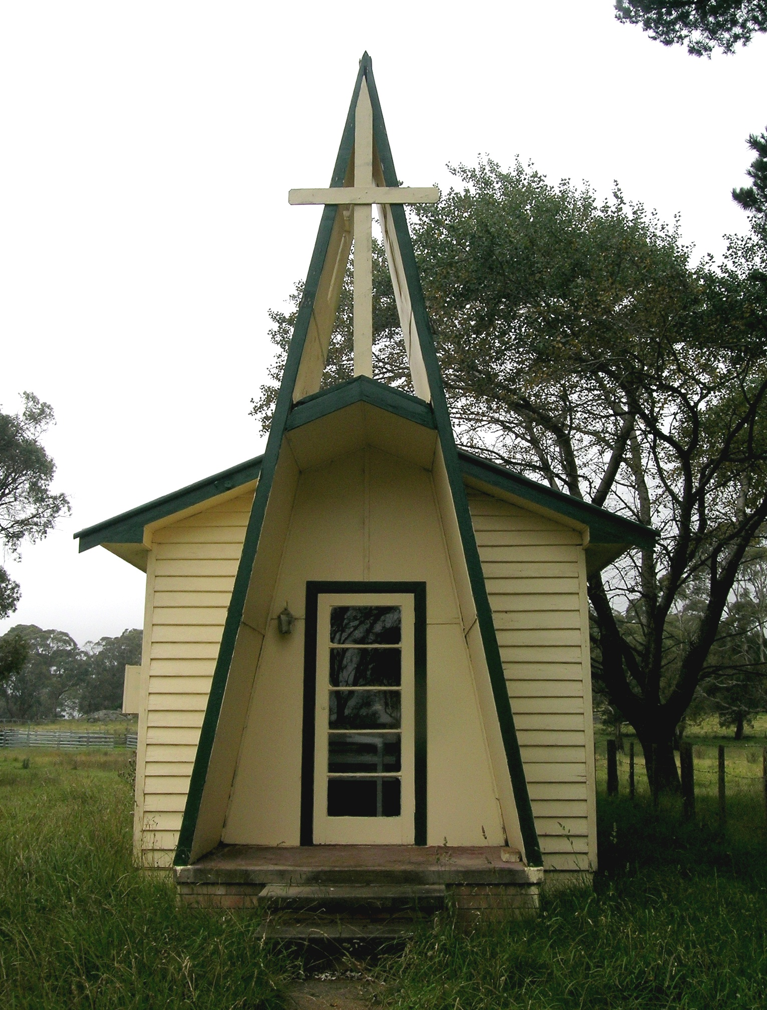 Brackendale, NSW church